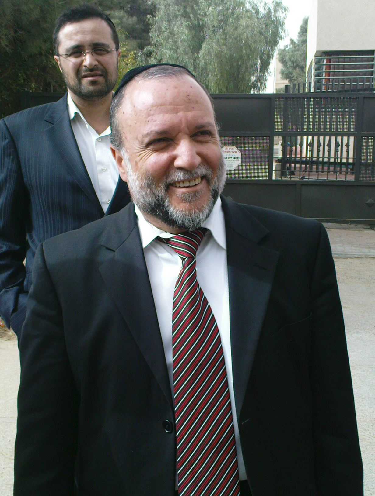 חבר הכנסת מטעם ש"ס, יצחק כהן, ביום הבחירות לכנסת ה-18